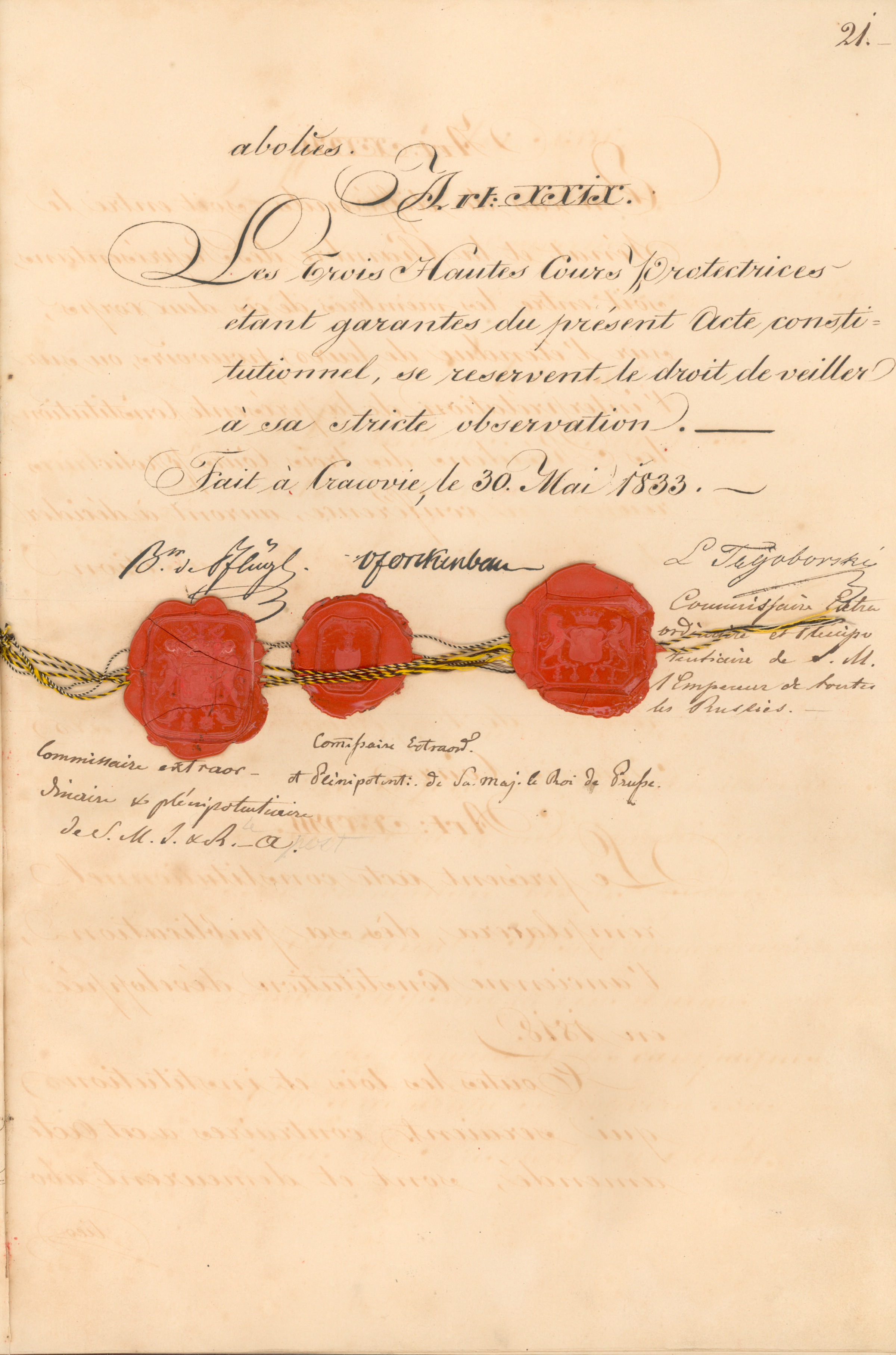 trzecia z kolei konstytucja Wolnego Miasta Krakowa (zwanego też Rzeczpospolitą Krakowską).